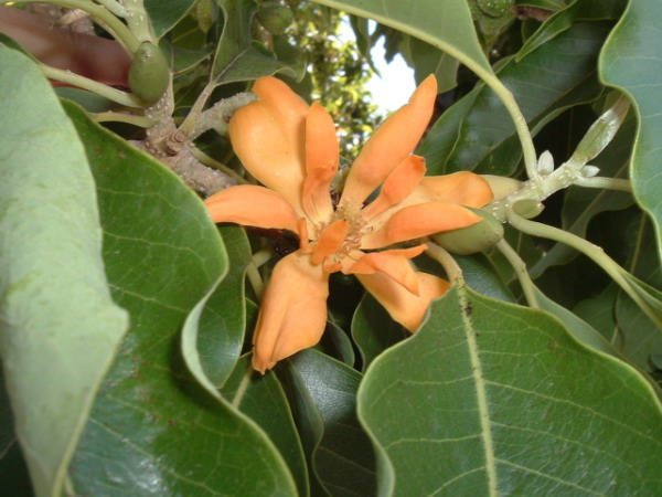 en la urbo Lavras, MG., Brazilo